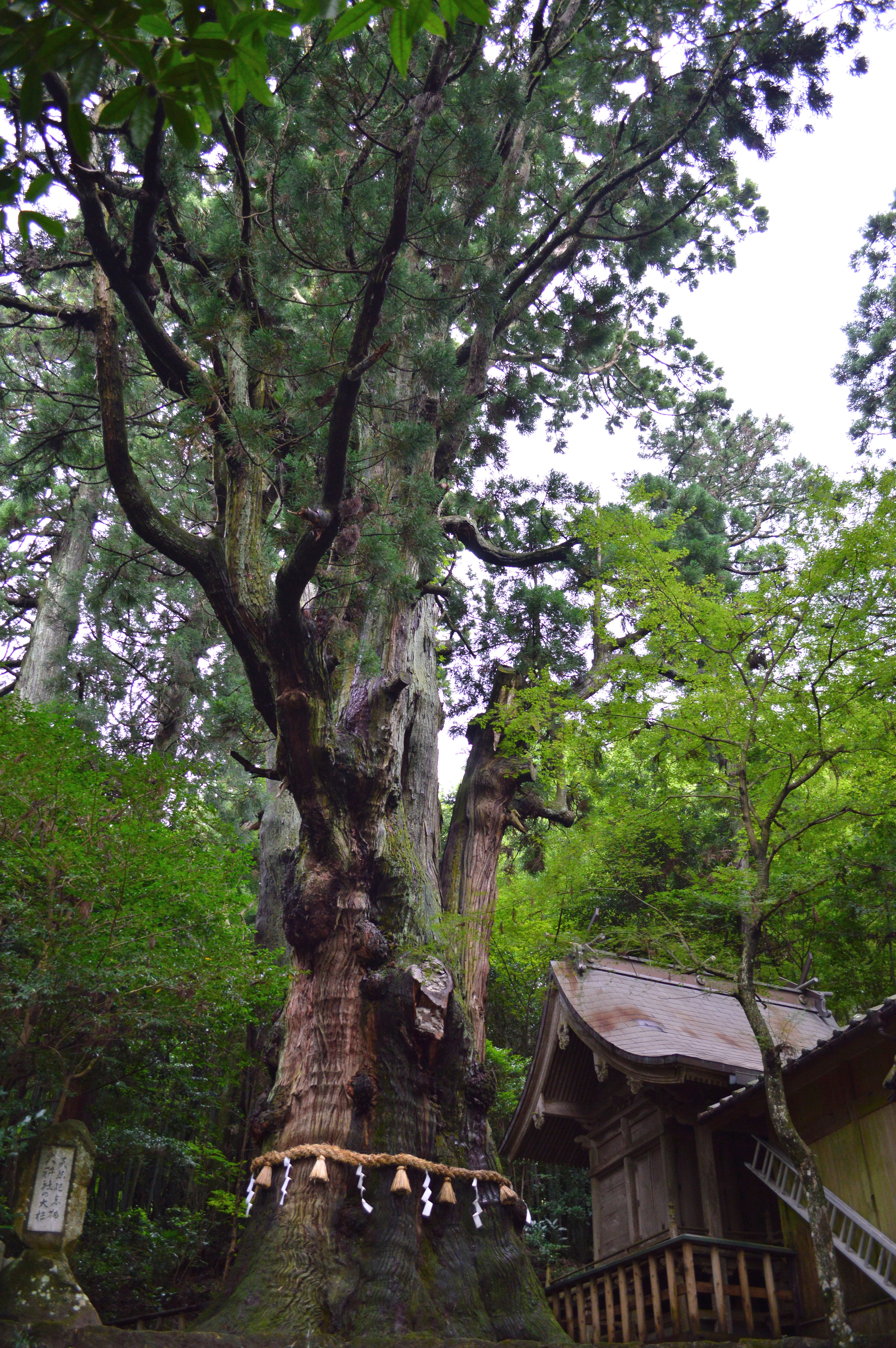 大杵社 (宇奈岐日女神社境外末社)と大スギ